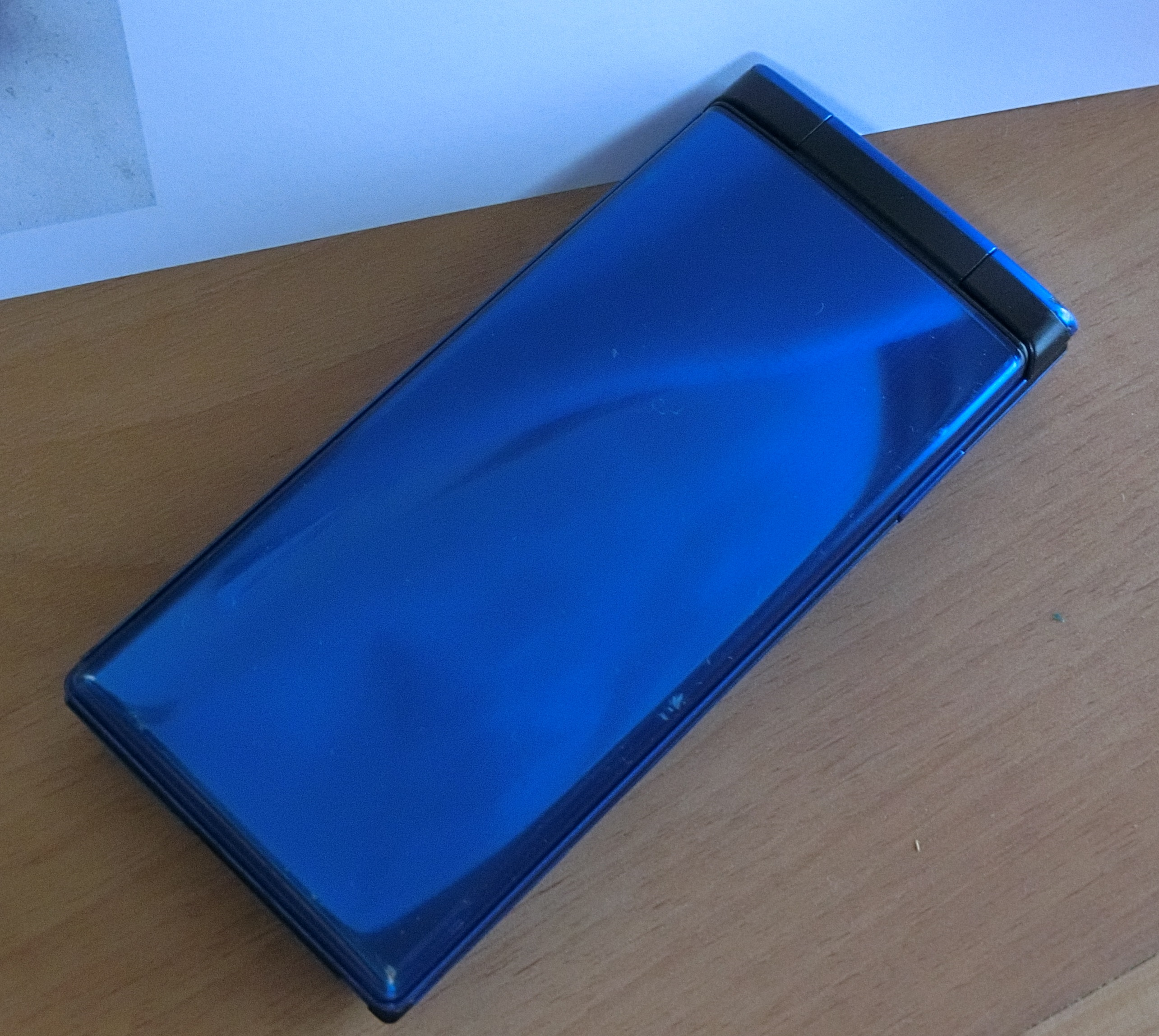 DIGNOケータイ表面